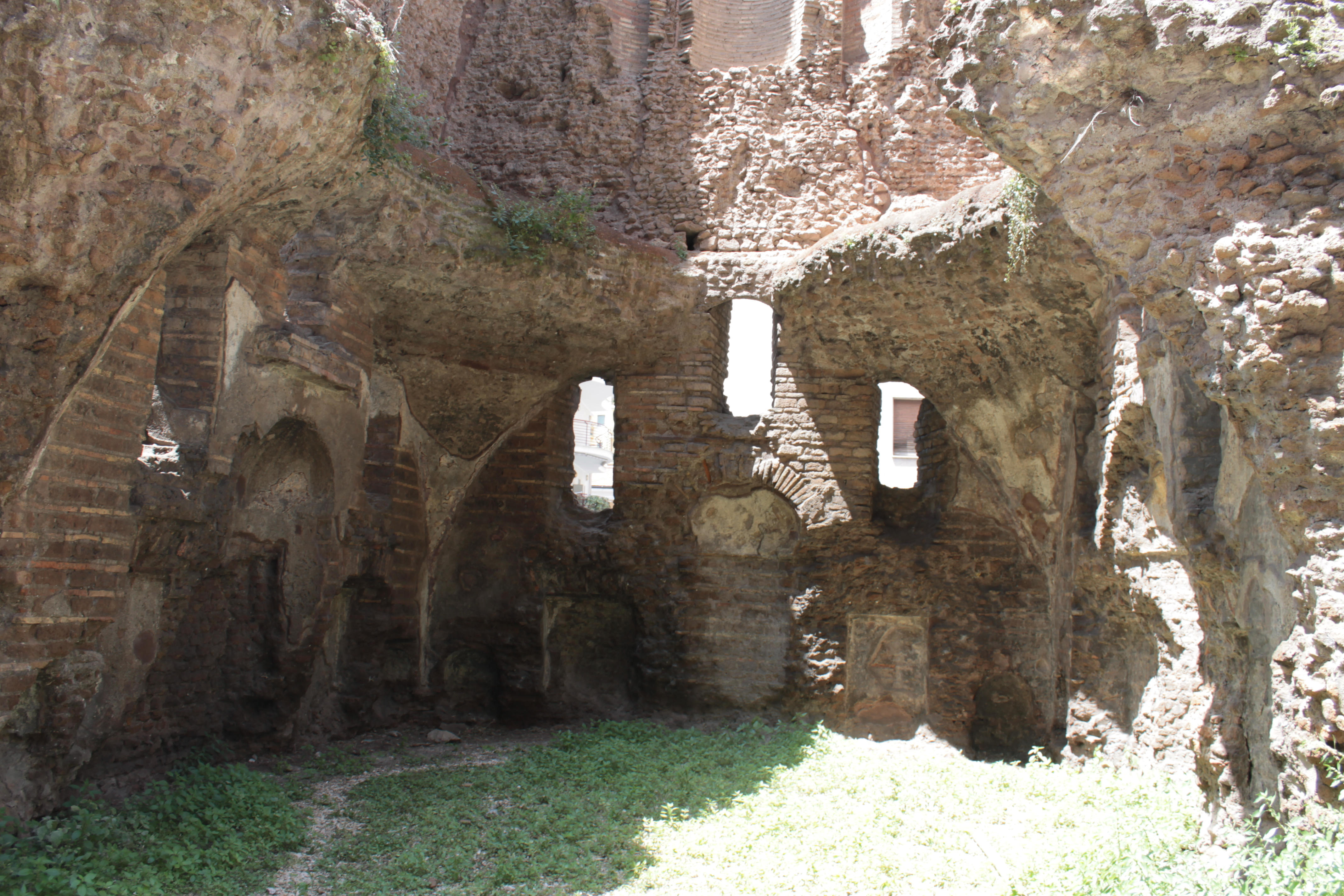 Sedia del Diavolo, veduta dell'interno This is a photo of a monument which is part of cultural heritage of Italy.